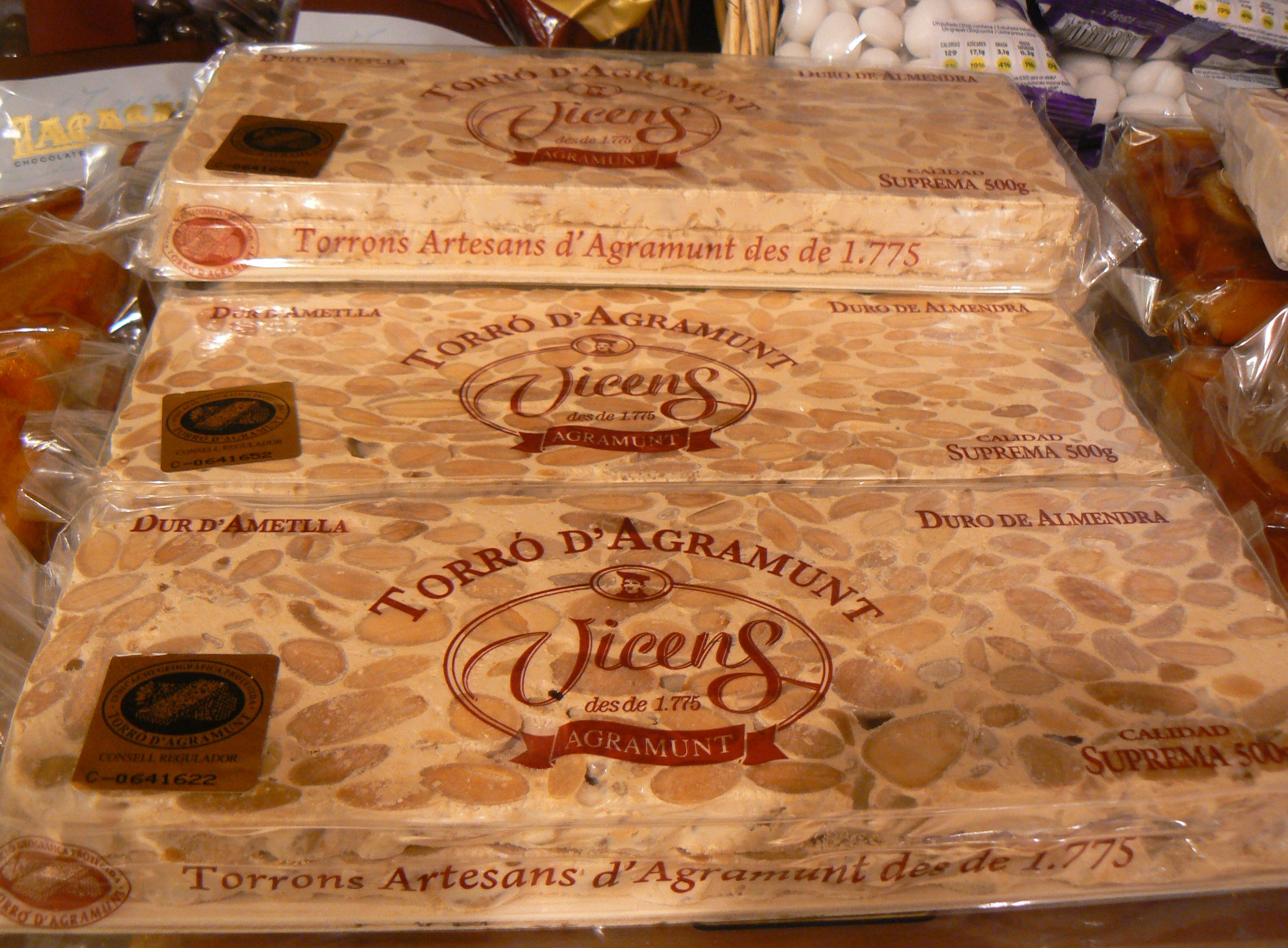 El torró d'Agramunt és un torró dur amb denominació d'origen menys coneguda que el d'Alacant fora de Catalunya. Aquest mateix torró és molt típic i tradicional també a Perpinyà.